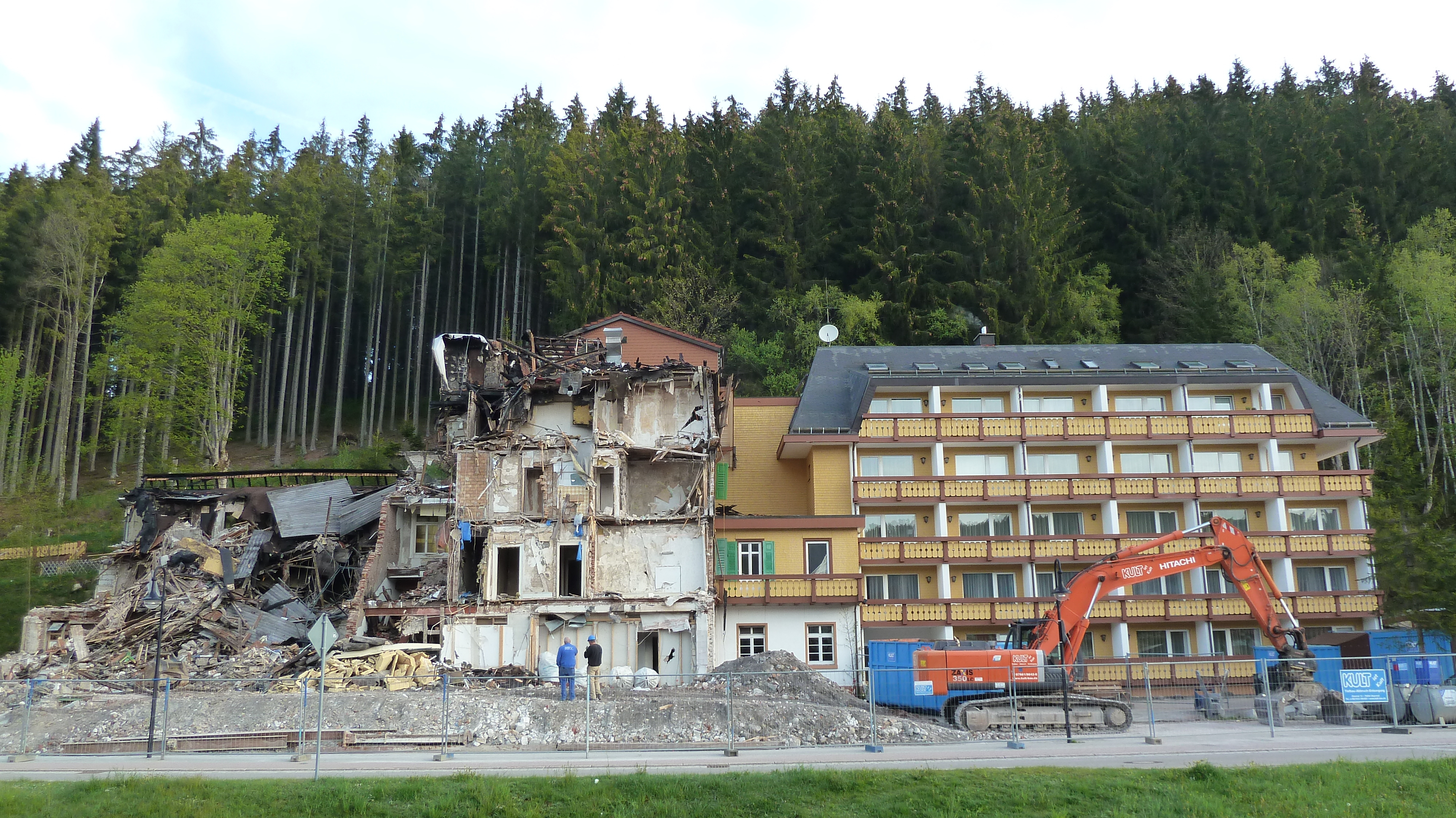 Abriss des Hotel Bären 2012